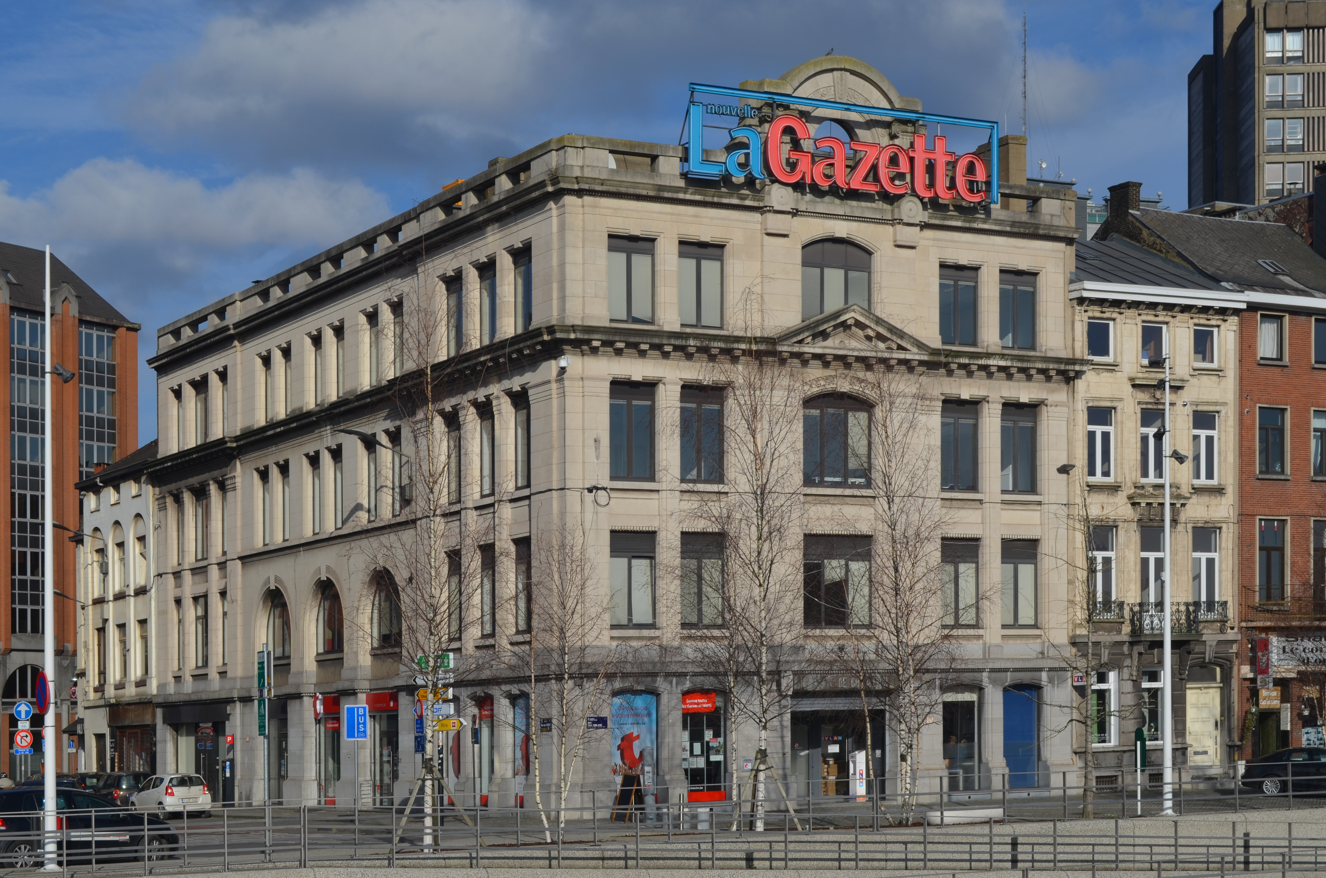 Charleroi - Bâtiment de La Nouvelle Gazette au quai Paul Verlaine, anciennement quai de Flandre.